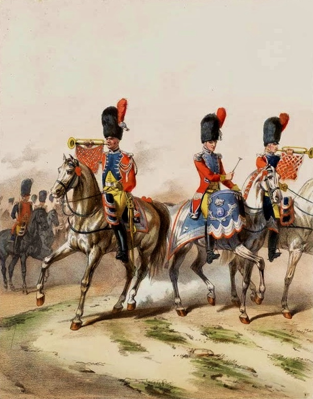 Gendarmerie d'élite de la Garde impériale, trompettes et timbalier, 1804.